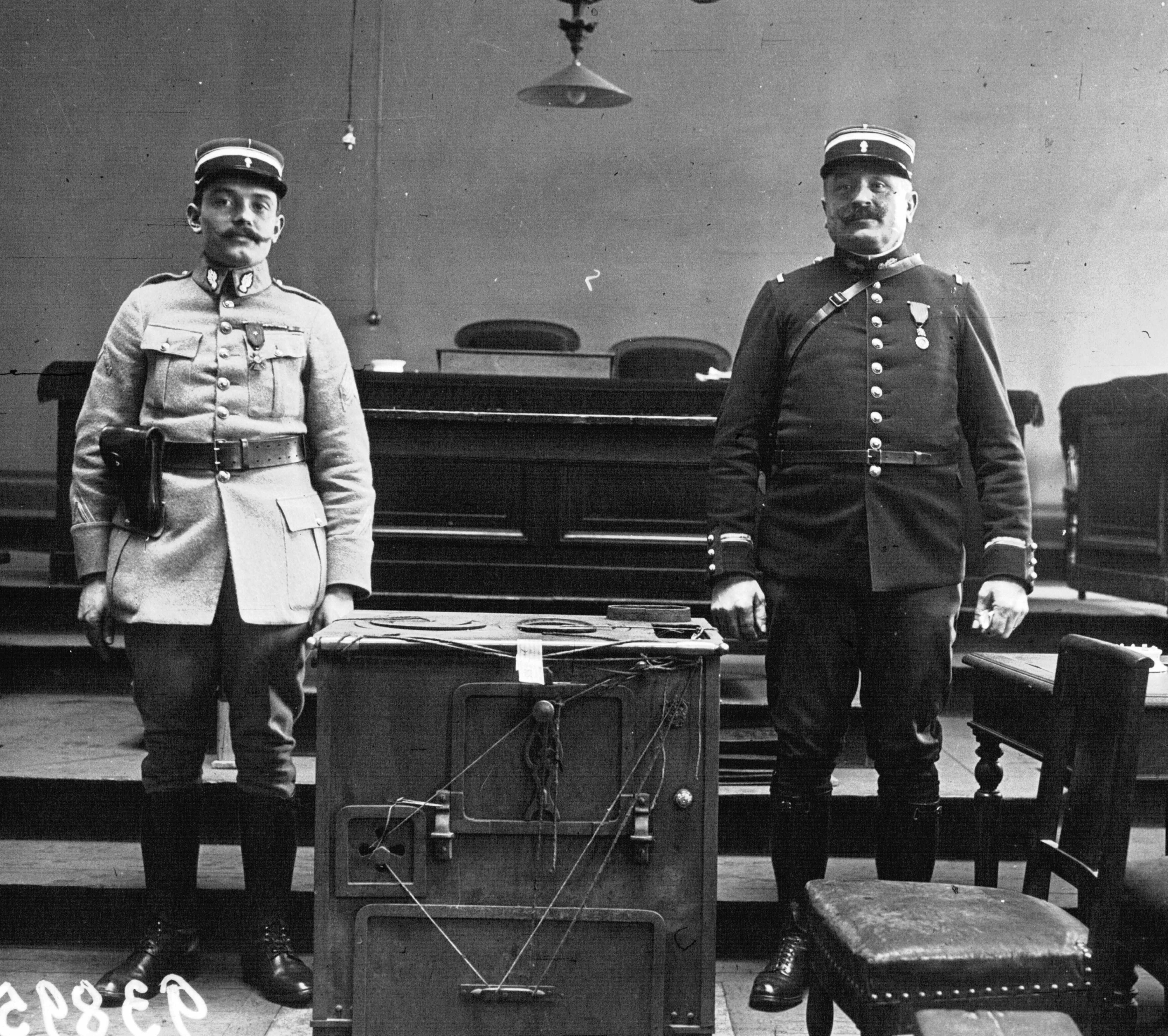 Le fourneau en pièce à conviction, procès de Henri Landru.